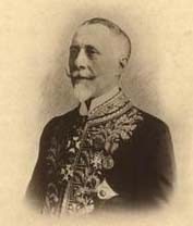 Gouverneur Raymond de Kerckhove - België